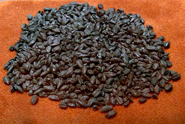 Trigo carbonizado procedente del yacimiento de El Soto de Medinilla, en Valladolid. Primera Edad del Hierro en el valle del Duero (España). Se conserva en el Museo Arqueológico de Valladolid